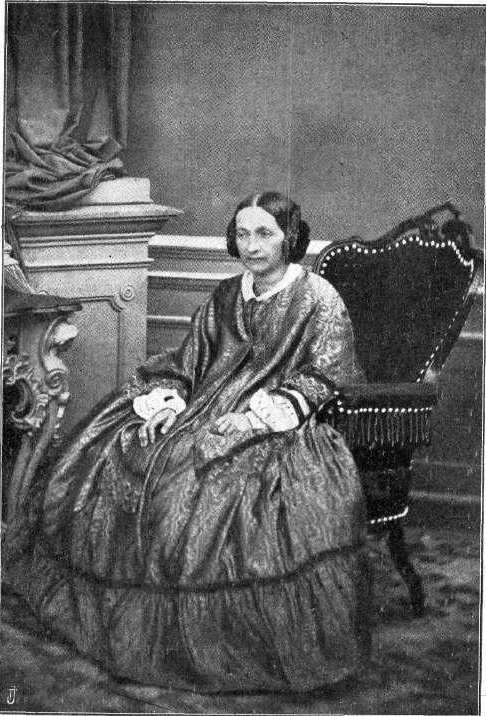 Primičeva Julija Par let pred smrtjo.